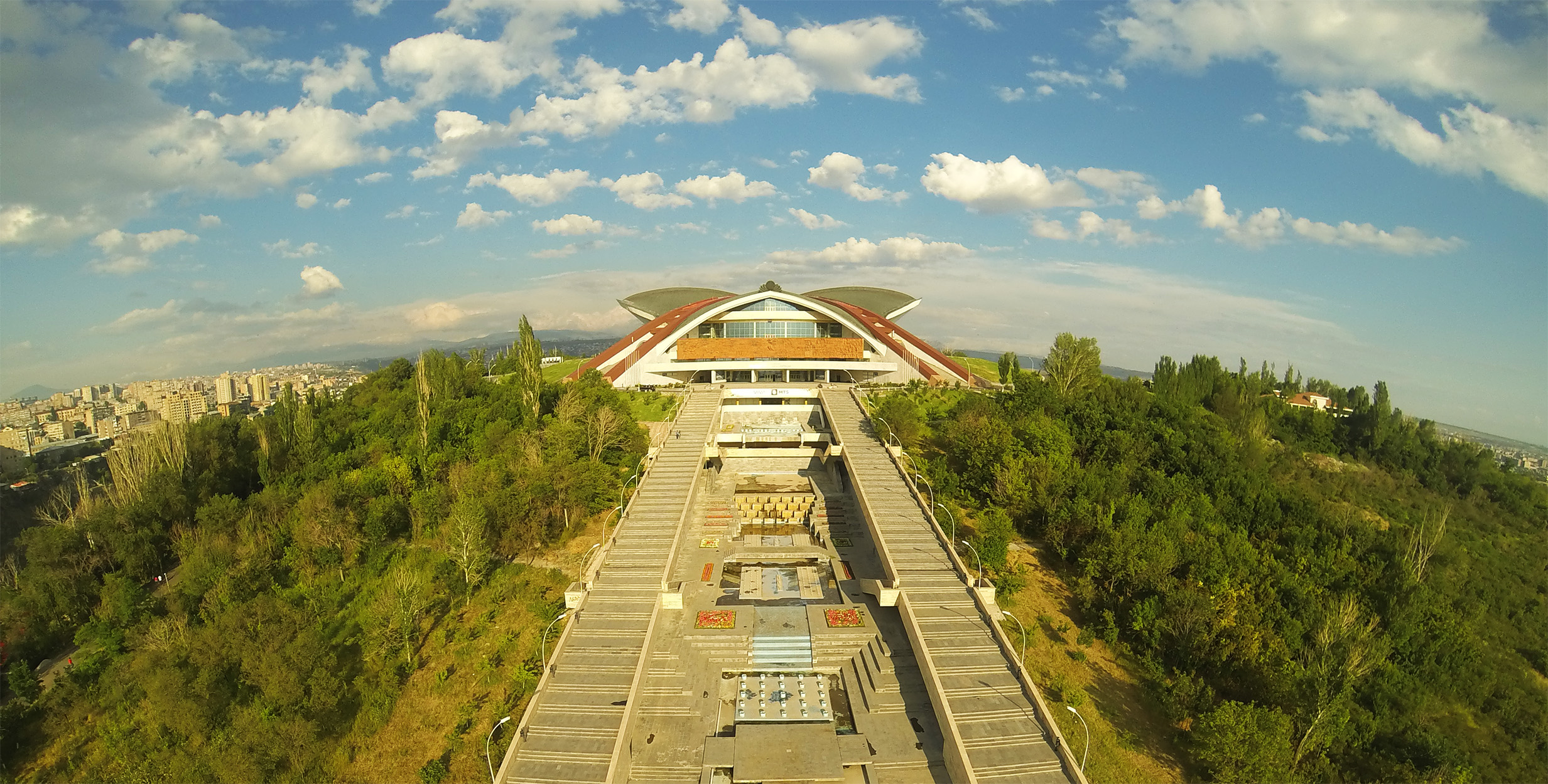 Մարզահամերգային Համալիր 360yerevan 6/148